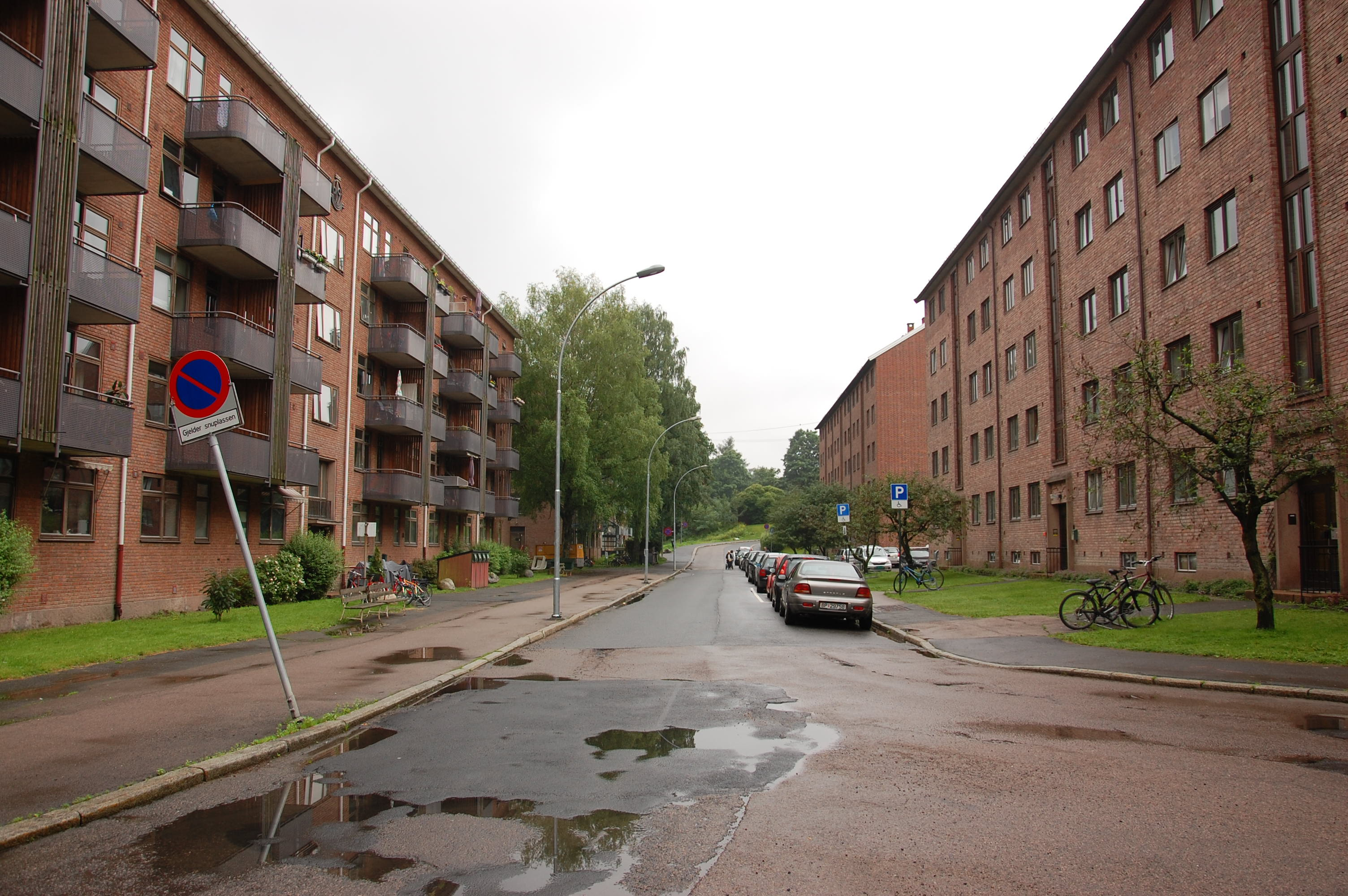 Mor Go'hjertas vei i Oslo